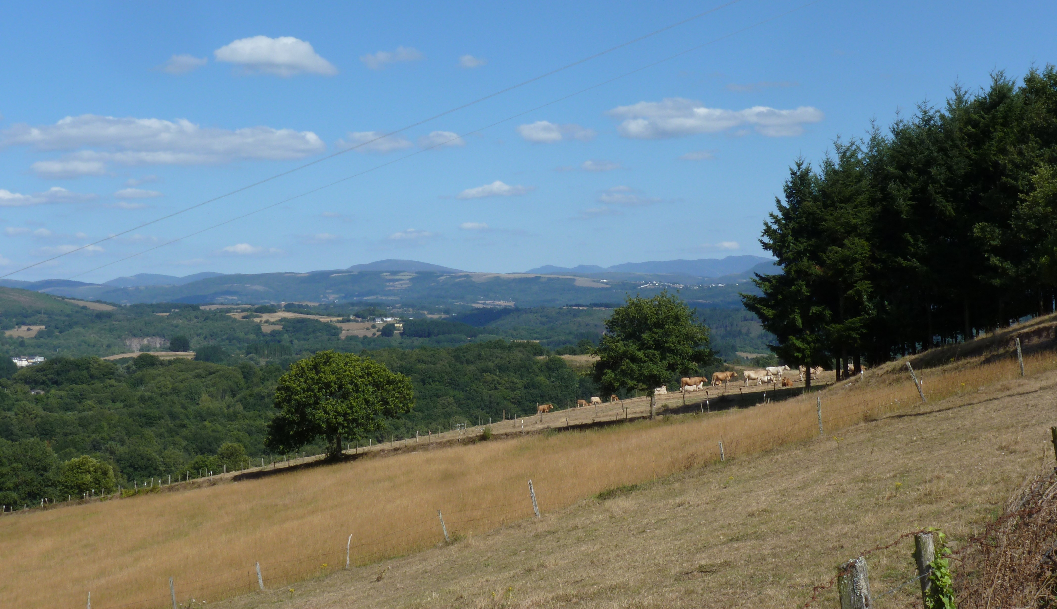 Paisaxe da Terra Brava do Incio, en Lugo